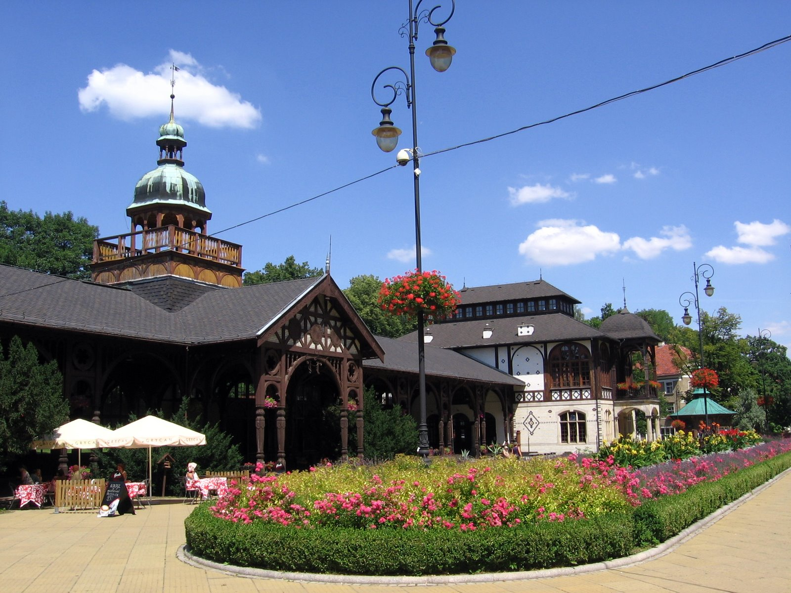 Szczawno-Zdrój - zespół zabudowań zdrojowych, 1822-1894: pijalnia wód (zabytek nr 671/WŁ)